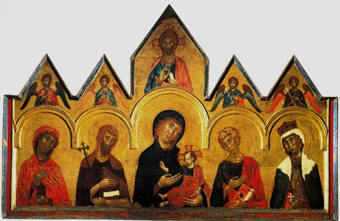 Из_цистерцианского_монатыря_санта